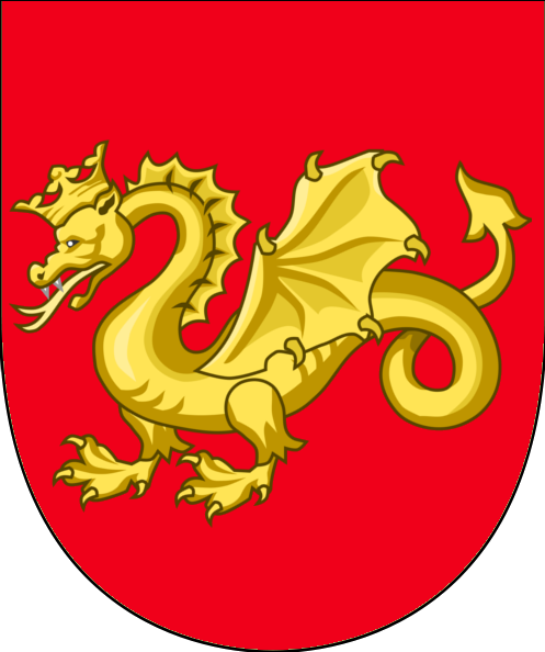 Våbenmærke